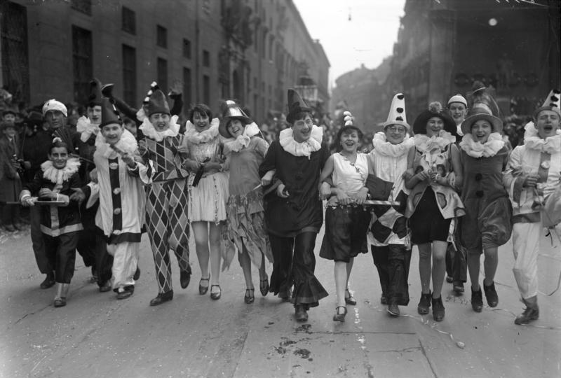 Faschingszeit ! Heimkehr eines lustigen Pierrots mit hübschen Masken vom Maskenball.